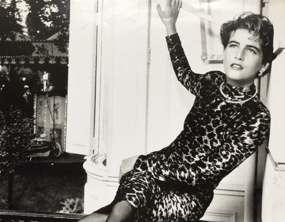 Portrait